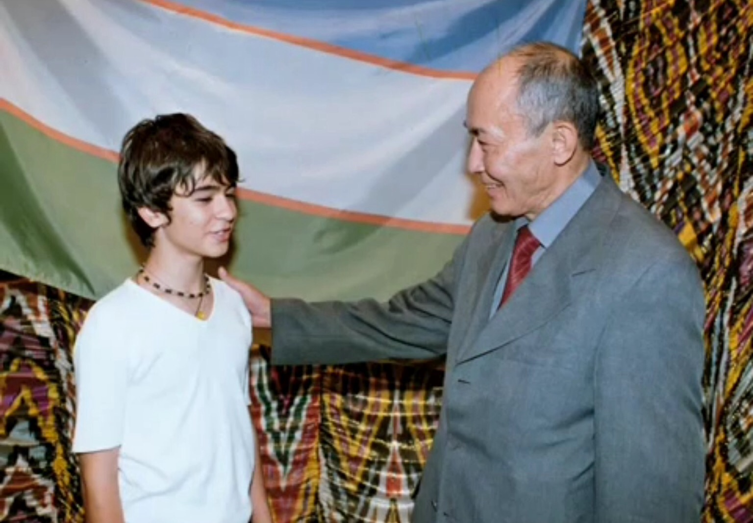 Абдулла Арипов и Сухроб Кенжаев